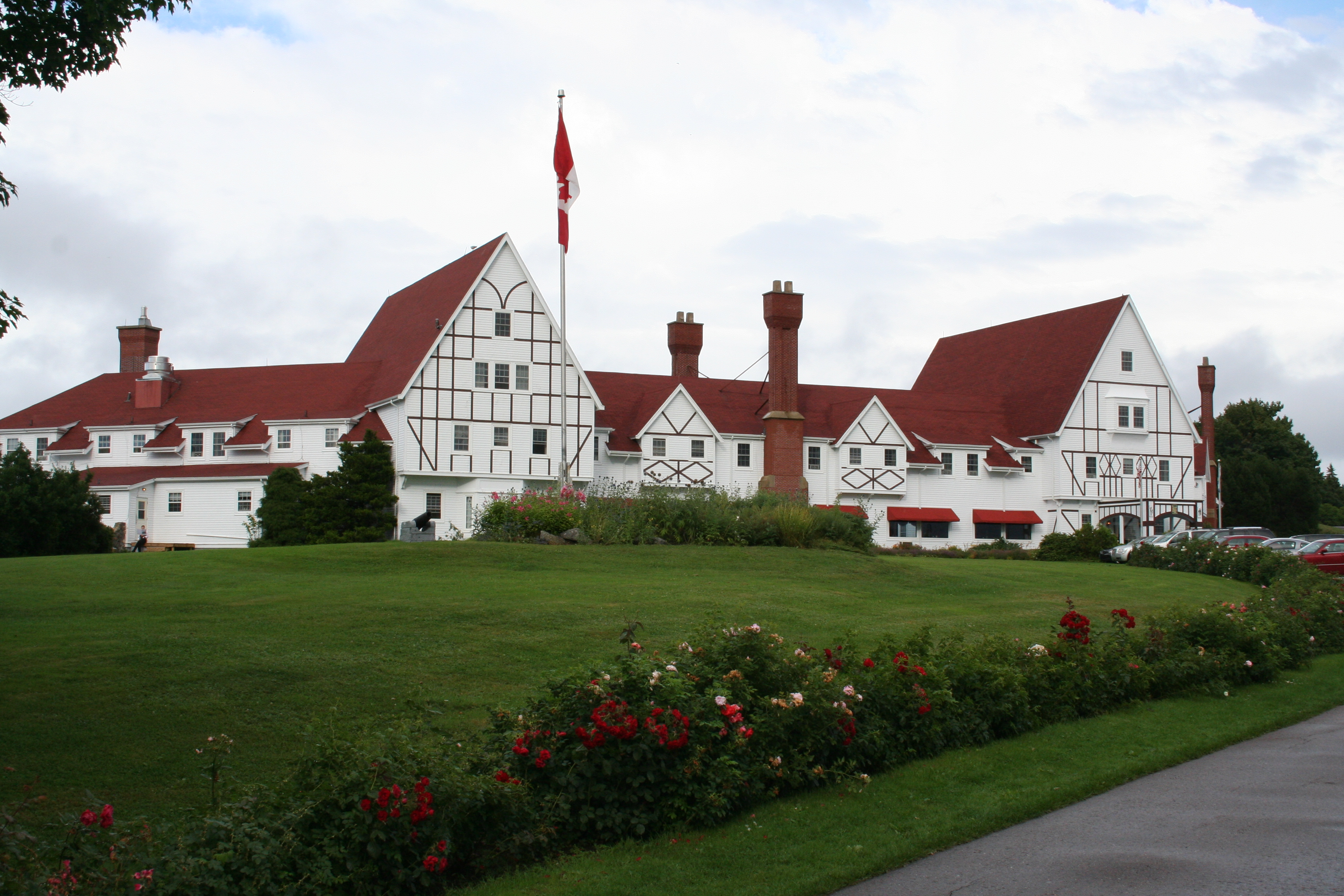 Le Keltic Lodge du Parc national des Hautes-Terres-du-Cap-Breton.